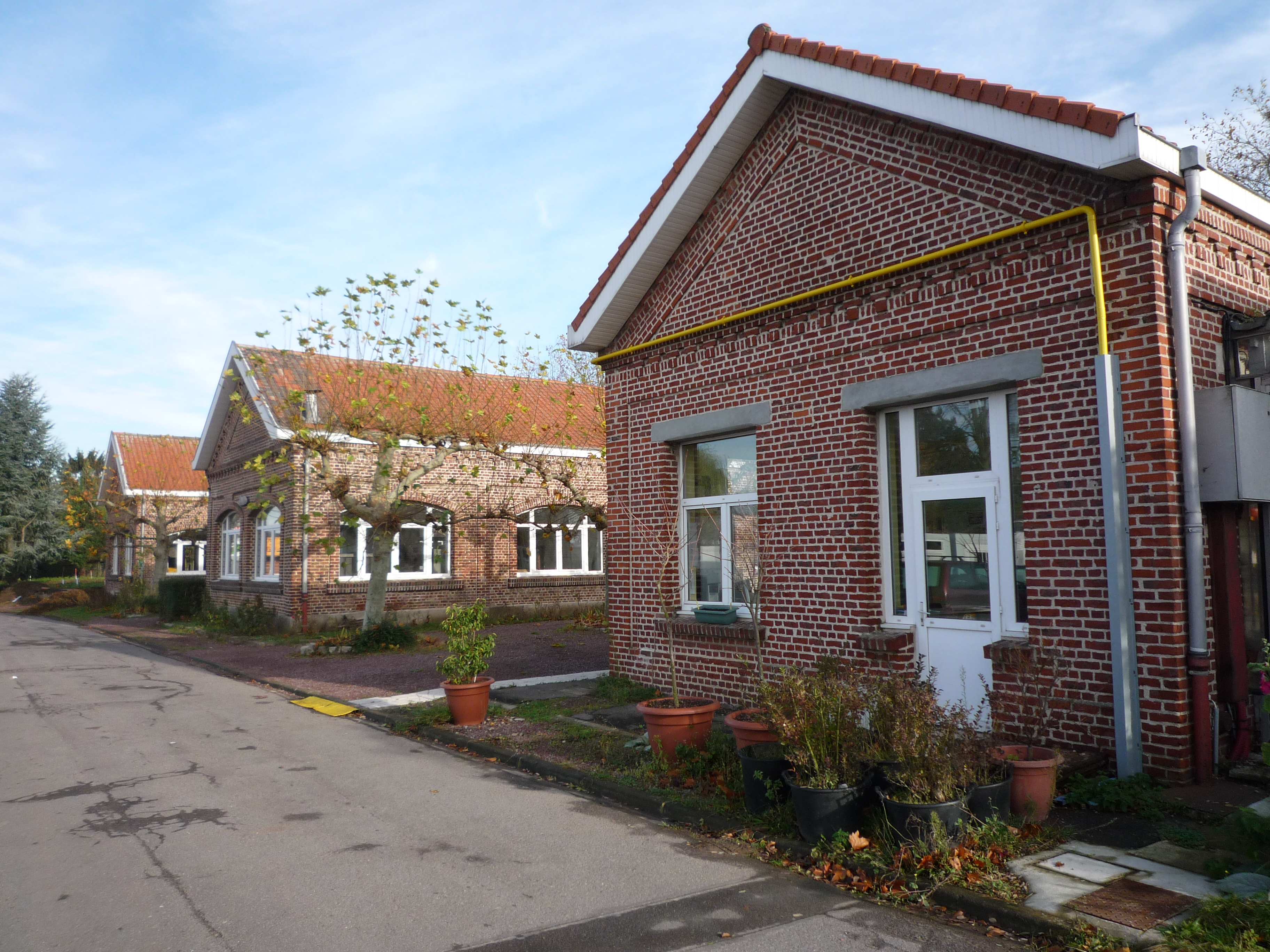 La Fosse n° 5 de la Compagnie des mines de l'Escarpelle était un charbonnage constitué d'un seul puits situé à Douai (Dorignies), Nord, Nord-Pas-de-Calais, France.